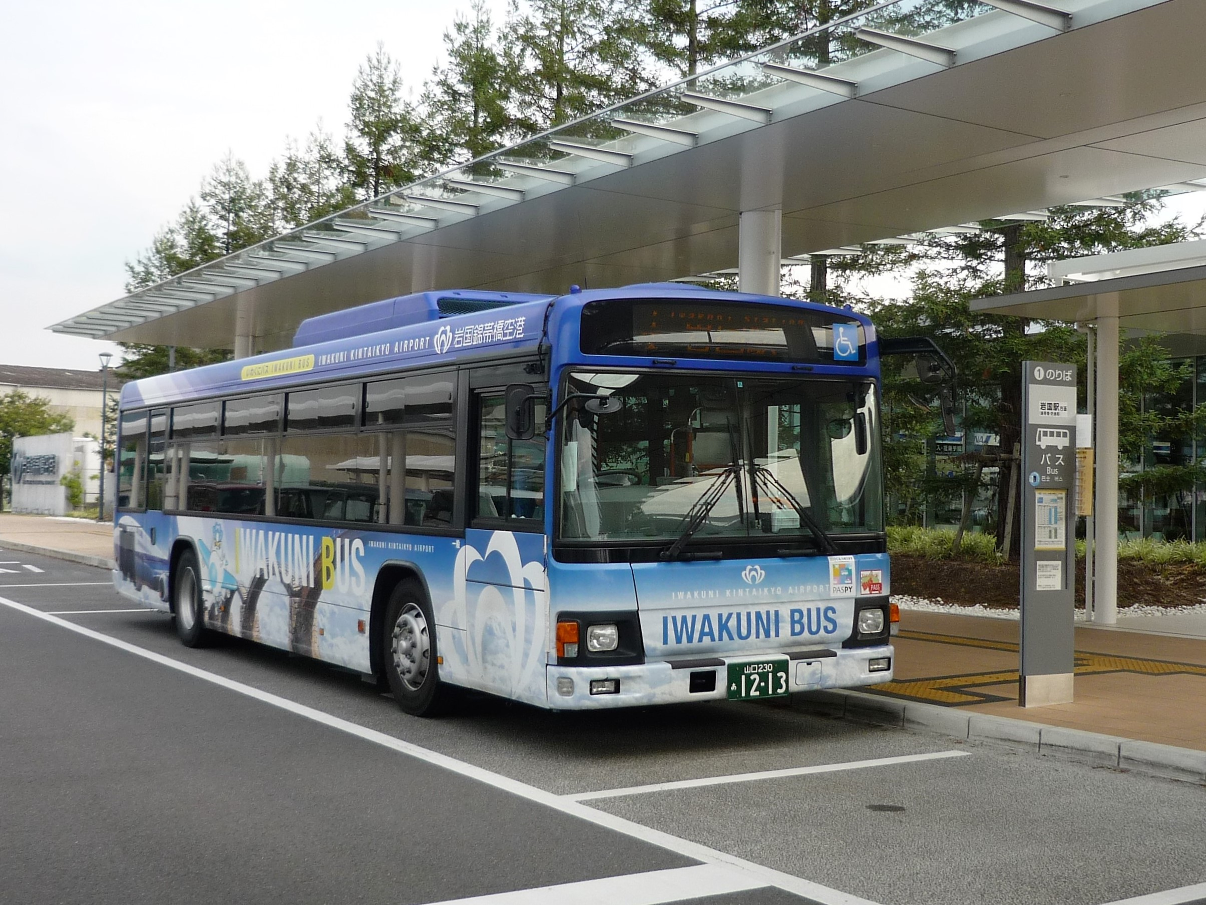 岩国錦帯橋空港に停車中のいわくにバス岩国駅方面行き